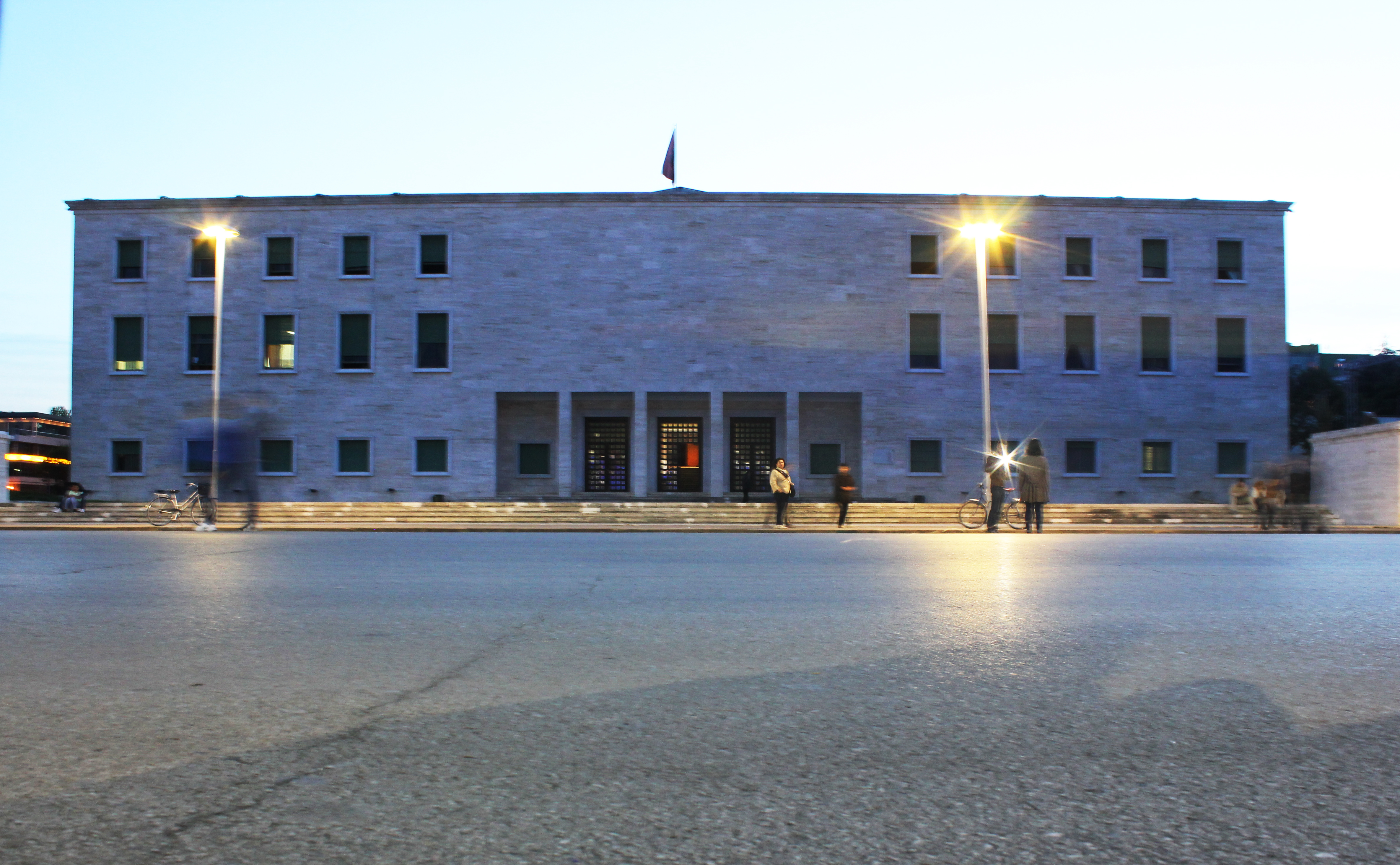 Akademia e Arteve